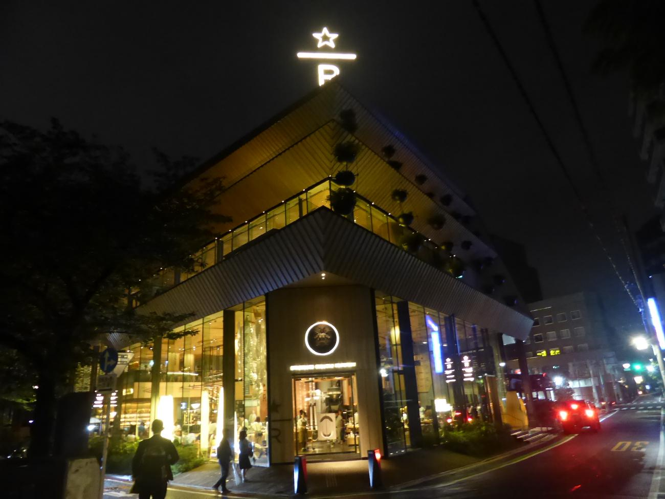 夜のスターバックス リザーブ ロースタリー 東京